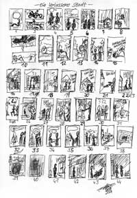 Storyboard